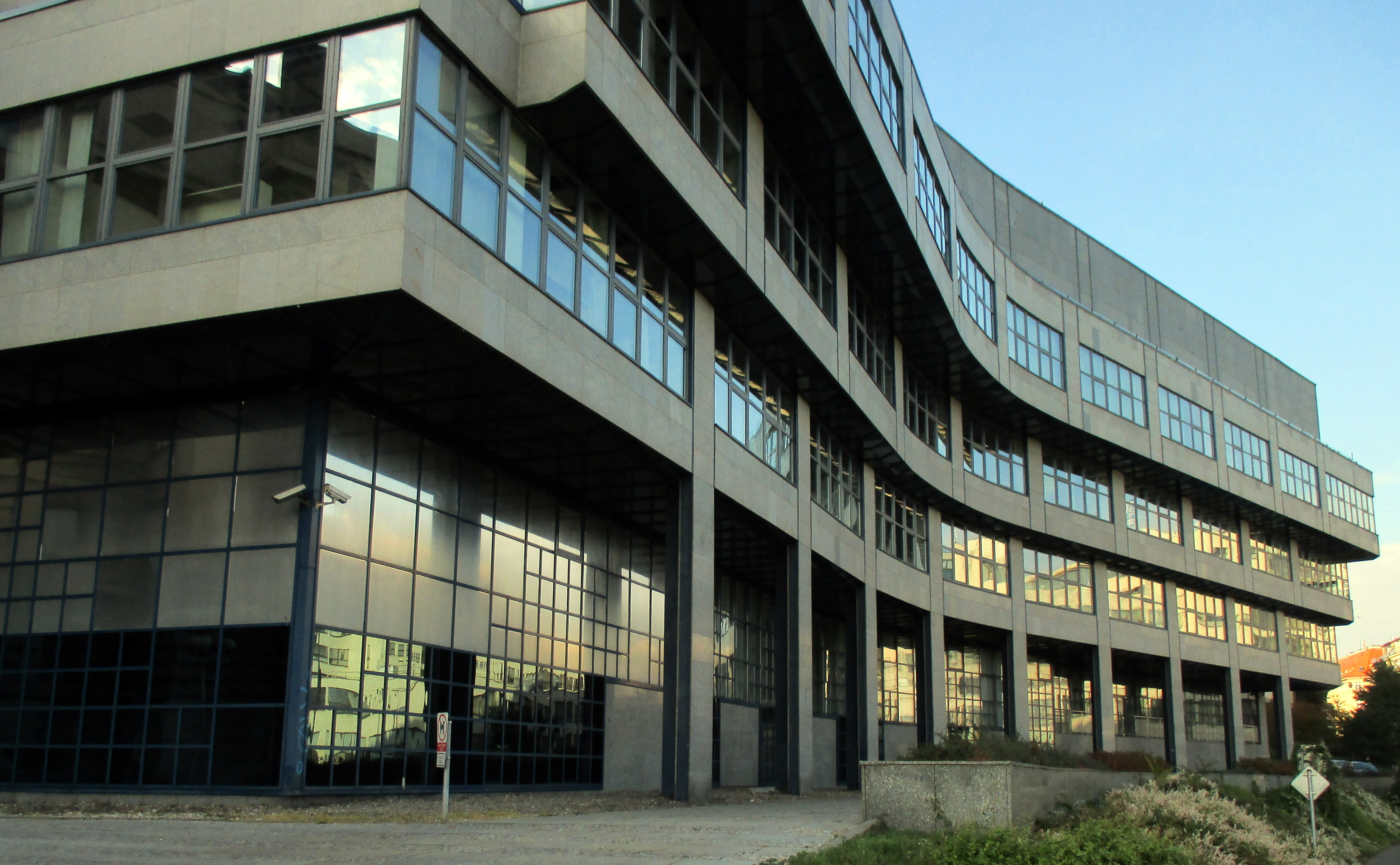 Rückseite der Agentur für das Europäische GNSS in Prag.